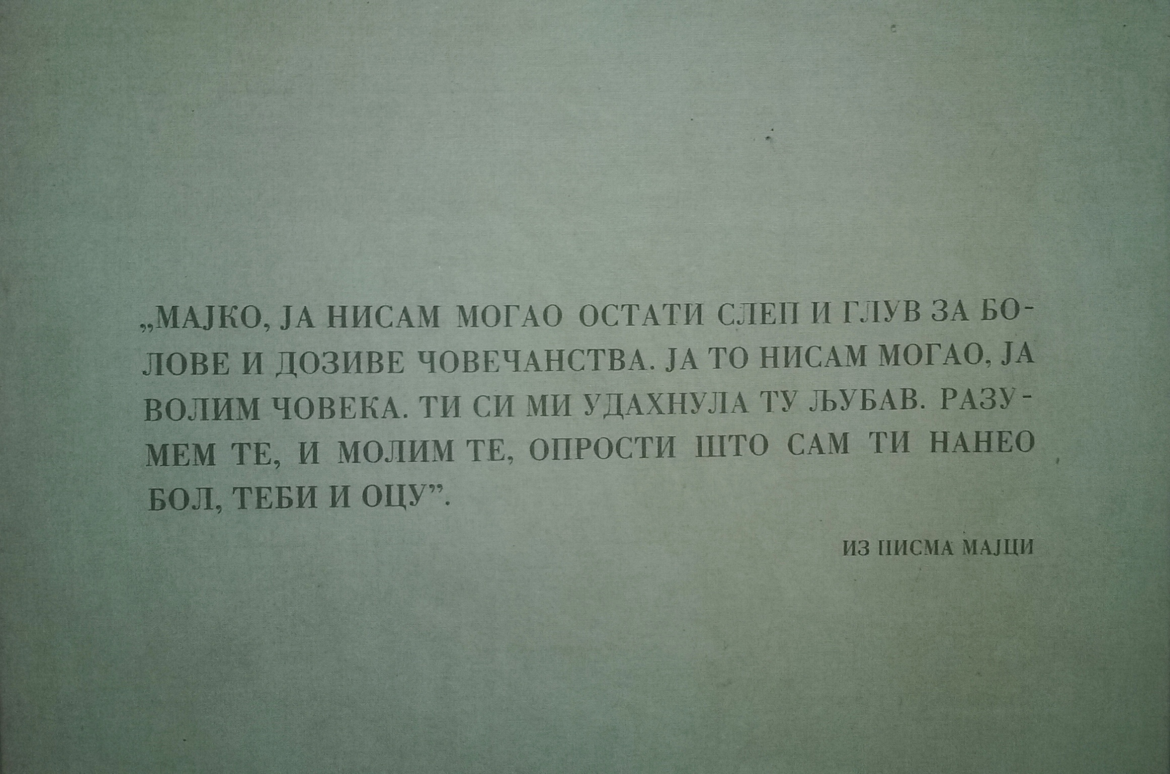 Из сталне поставке Музеја 7. јули 1941. у Белој Црви, код Крупња.